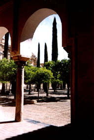 Córdoba, Spania. Motive: La Mezquita